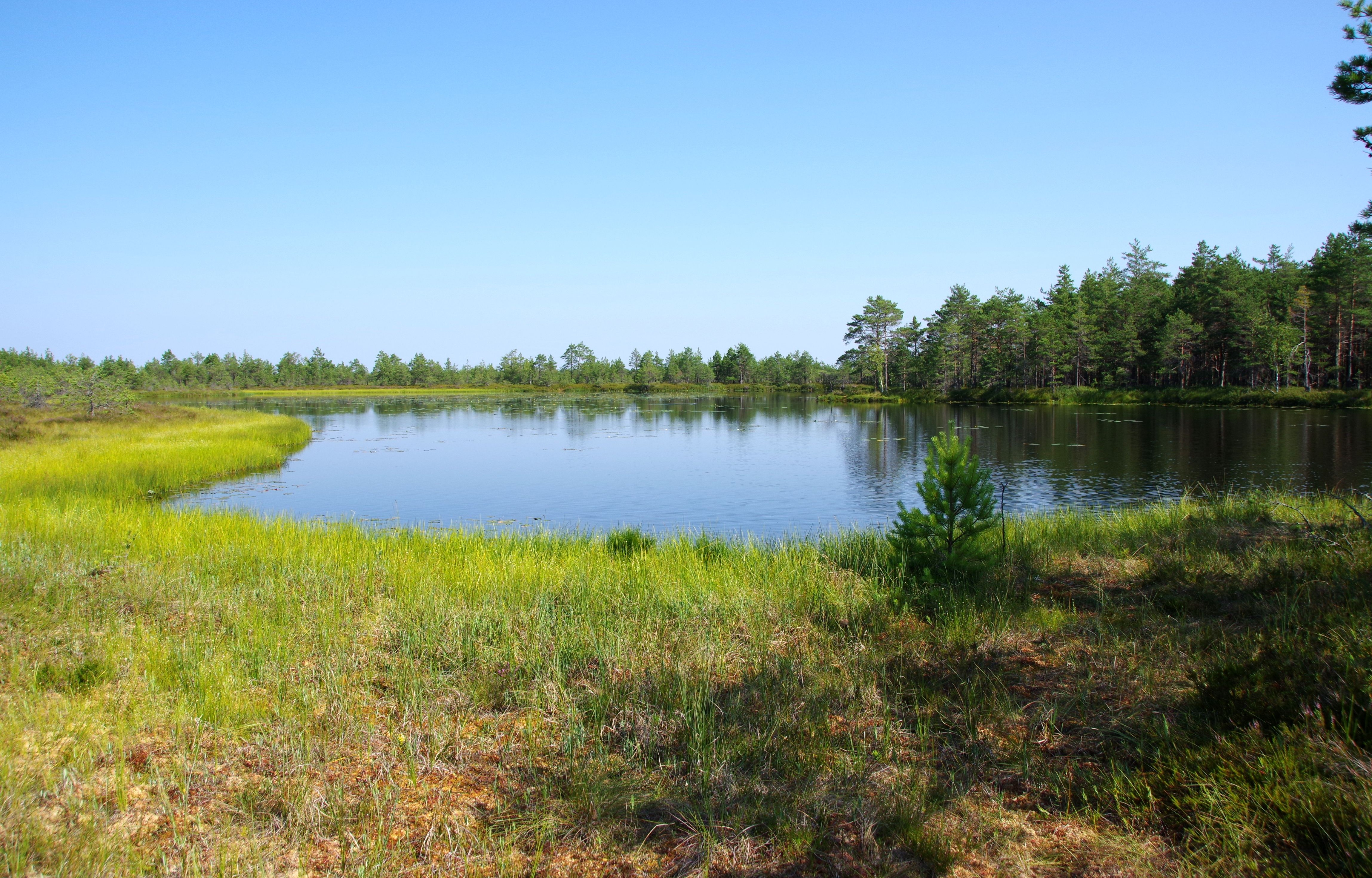 Pilli järv on järv Harju maakonnas Lääne-Harju vallas Hatu külas.